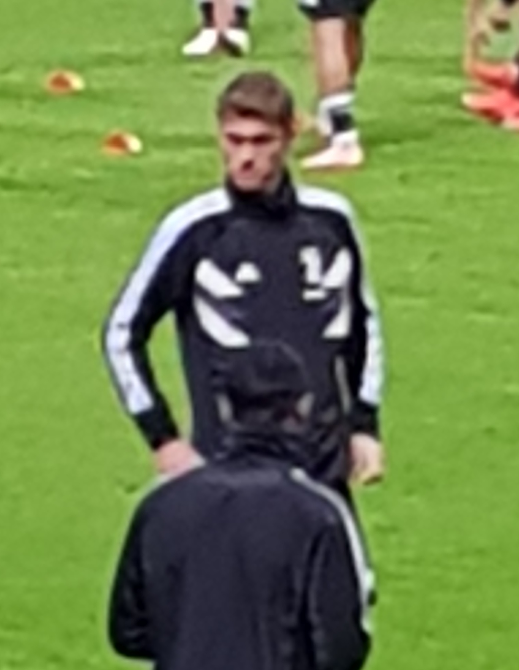 Milan-Juventus 0-2, 11 novembre 2018